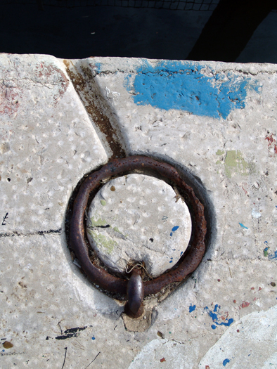 Giclée sobre tela